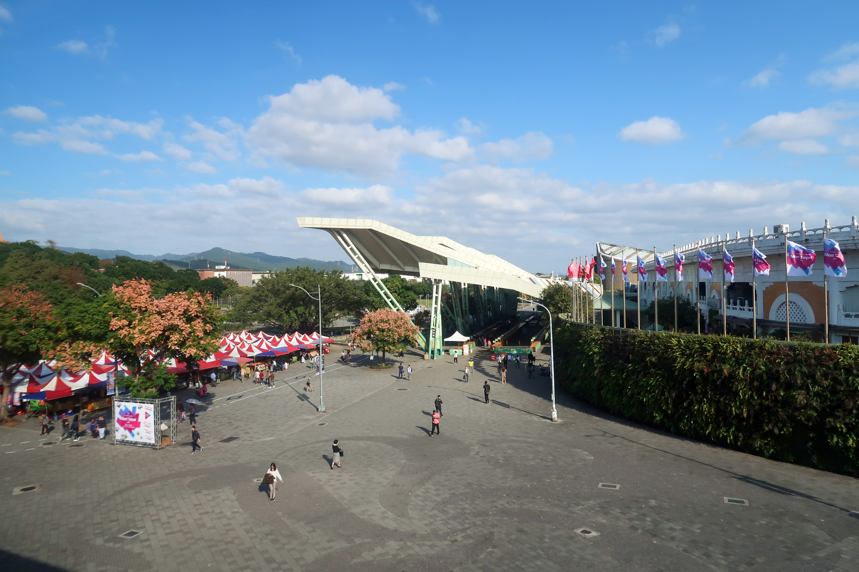 Taipei Expo Park Entry Plaza